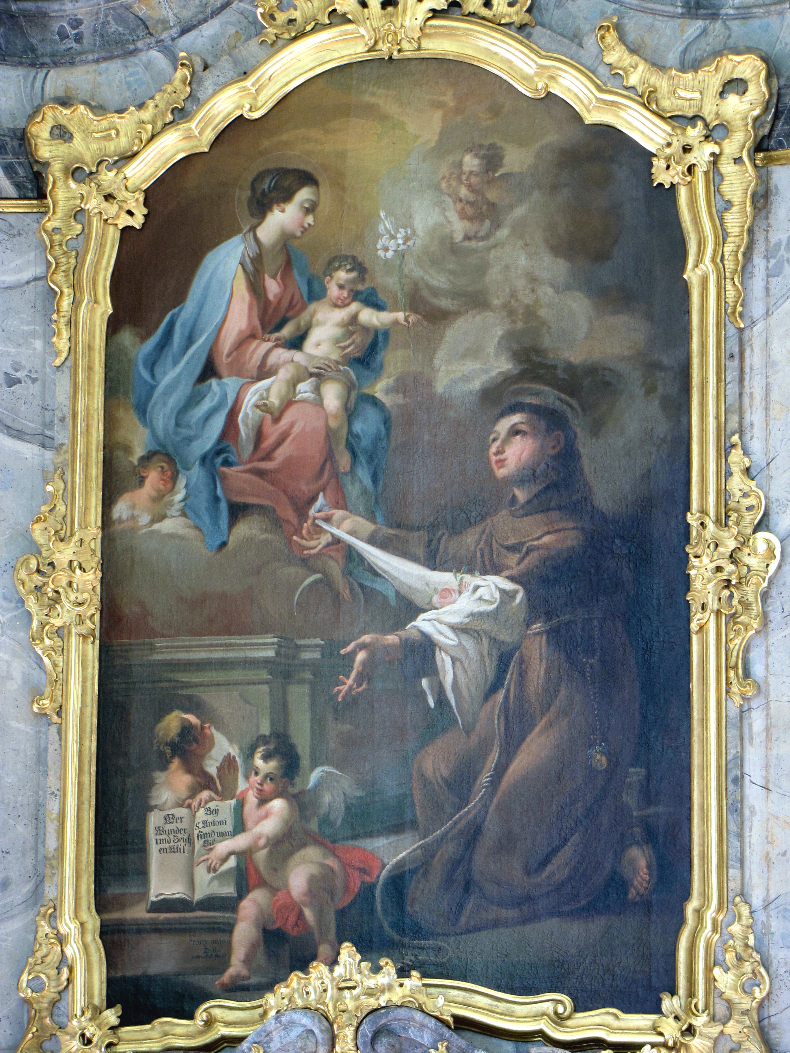 Altarblatt von Franz Anton Zeiller am Seitenaltar der Wallfahrtskirche Maria Rain, 1761